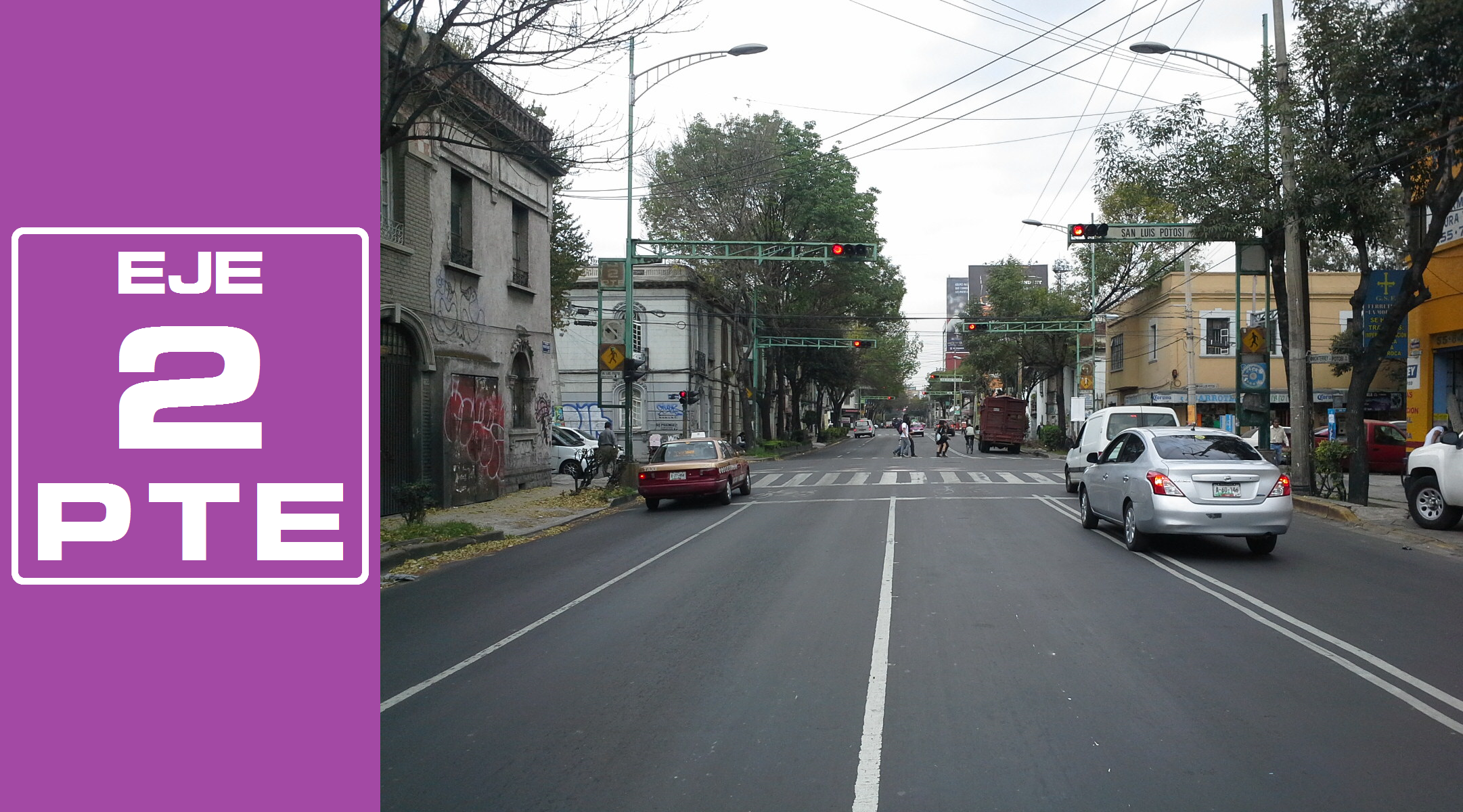 Rediseñado original de la señalética de los Ejes viales de la Ciudad de México por José García (Wiki ID: narumiyama)